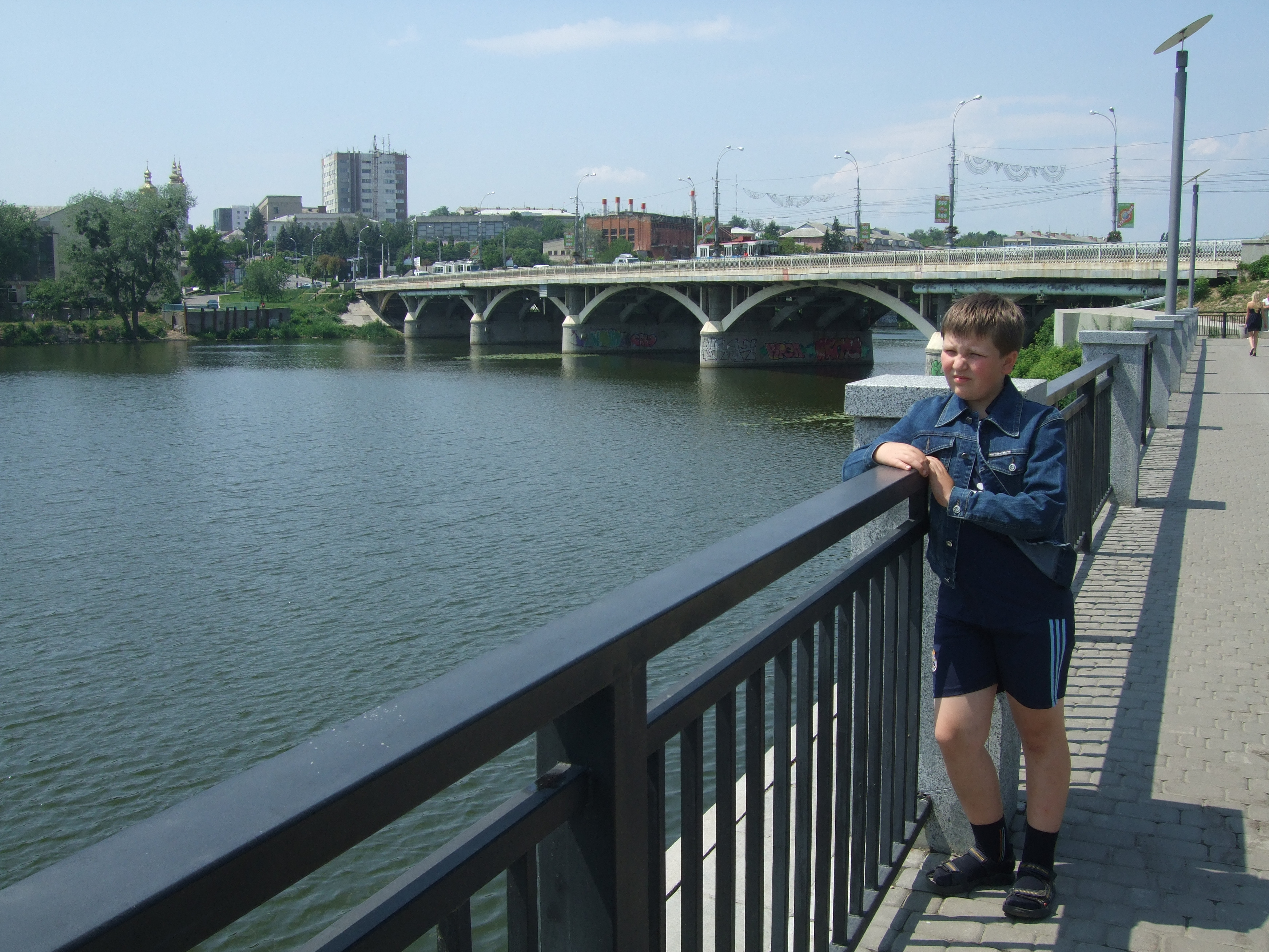 Вінниця - шоколадна фабрика РОШЕН